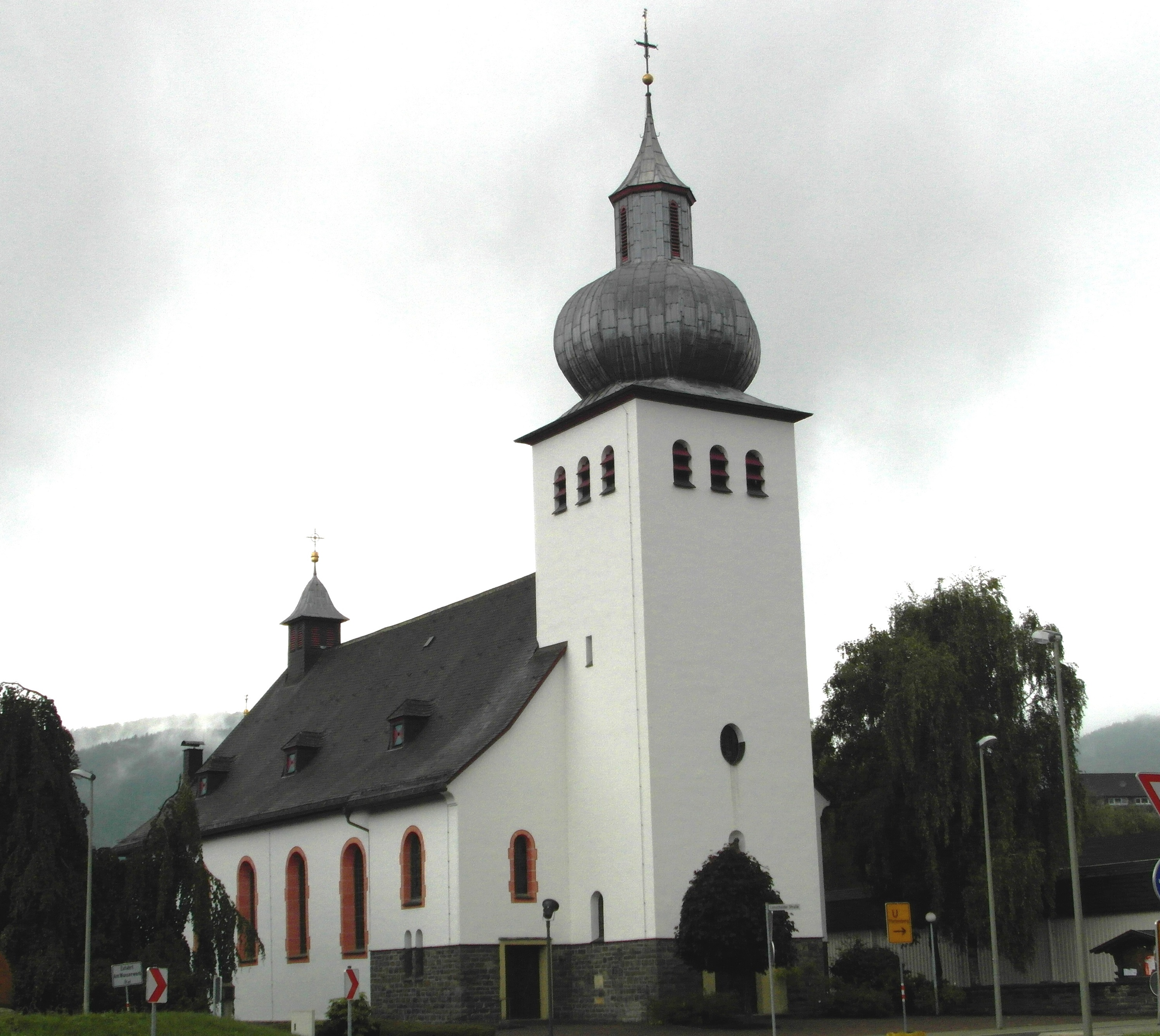 Kath. Pfarrkirche St. Antonius Einsiedler in Rönkhausen - Finnentrop